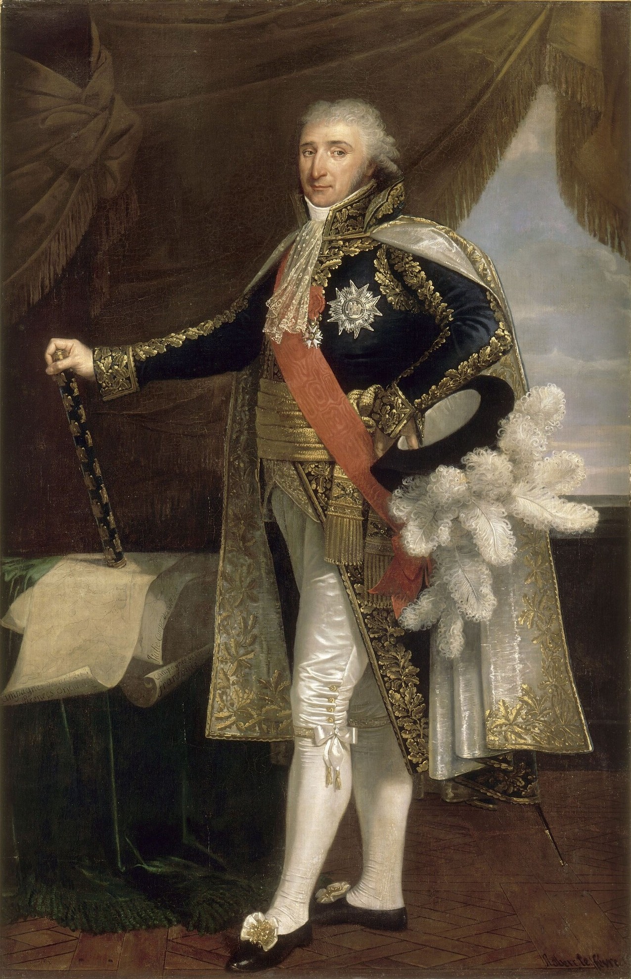 Maréchal Pierre Augereau (1757-1816), duc de Castiglione